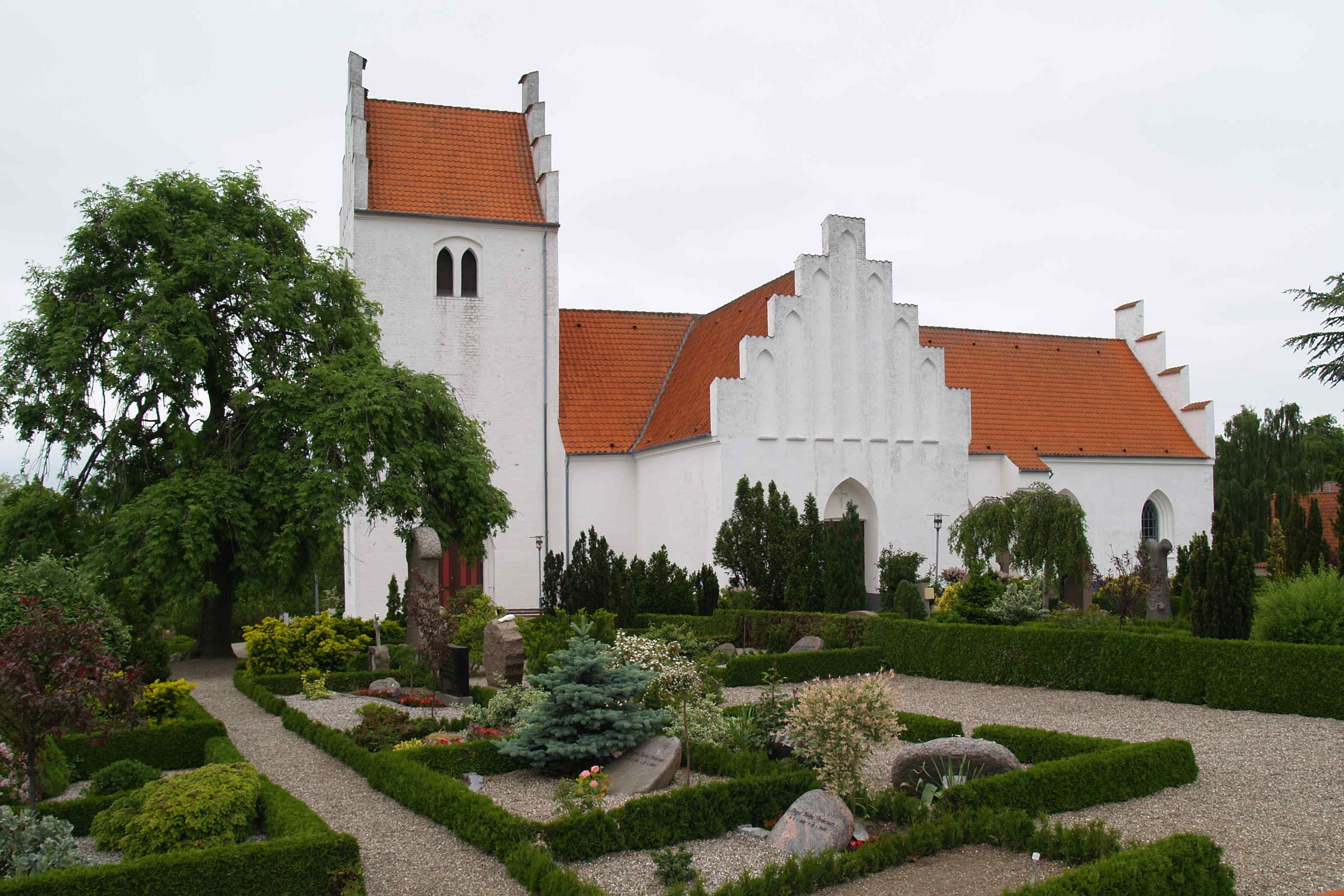 Vemmelev Kirke, Slagelse Provsti (Kirchenkreis Slagelse)